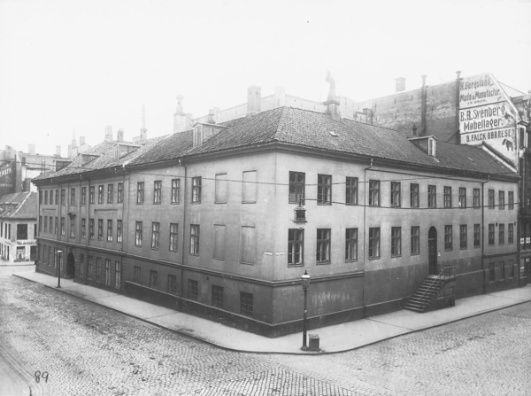 Mariboegården i Prinsens gate 20 i Oslo. Oppført ca. 1810 for forretningsmannen Ludvig Mariboe, revet 1917 for å skaffe plass til Telegrafbygninga. Opprinnelig forretningsgård med boliger. Kjøpt av staten i 1820 til hovedbygning for Universitetet. Fra 1852 kontorer for Revisjonsdepartementet.